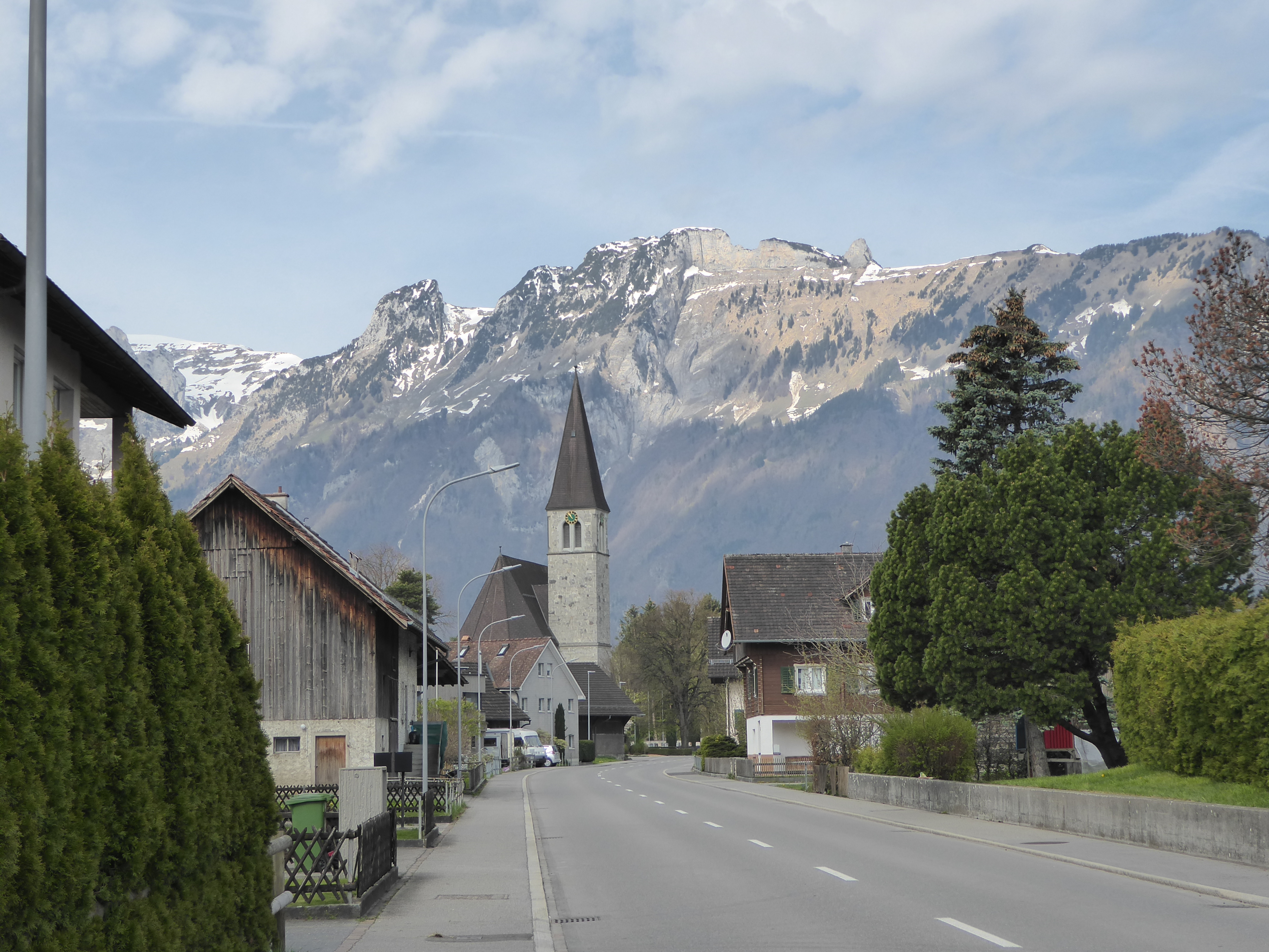 Ruggell Schellenbergstrasse, im Hintergrund Kreuzberge